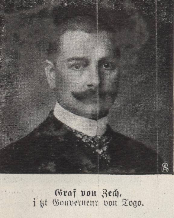 Julius Graf vpn Zech, Gouverneur von Togo